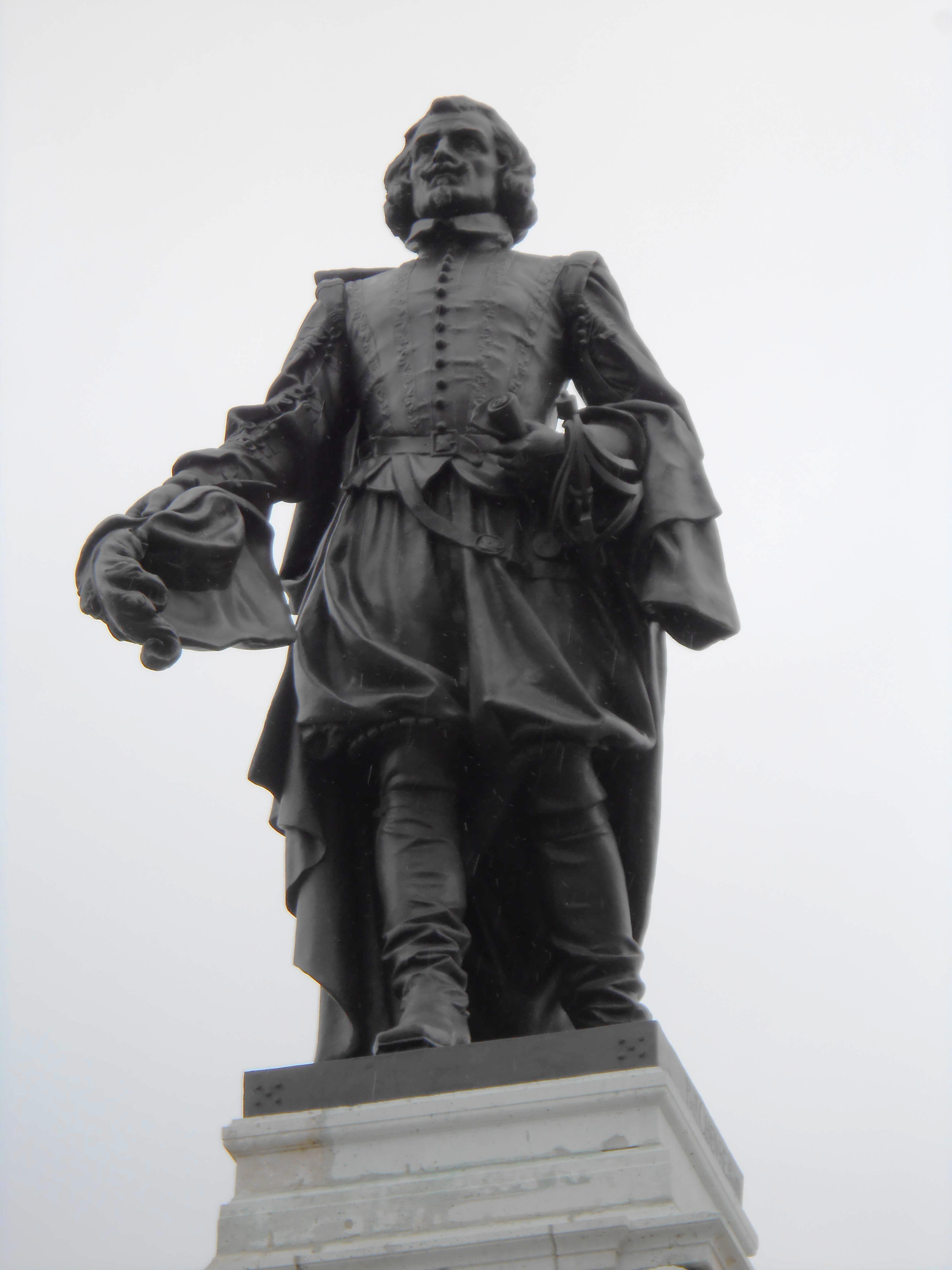 Monument de Samuel-de-Champlain, Haute-Ville du Vieux-Québec